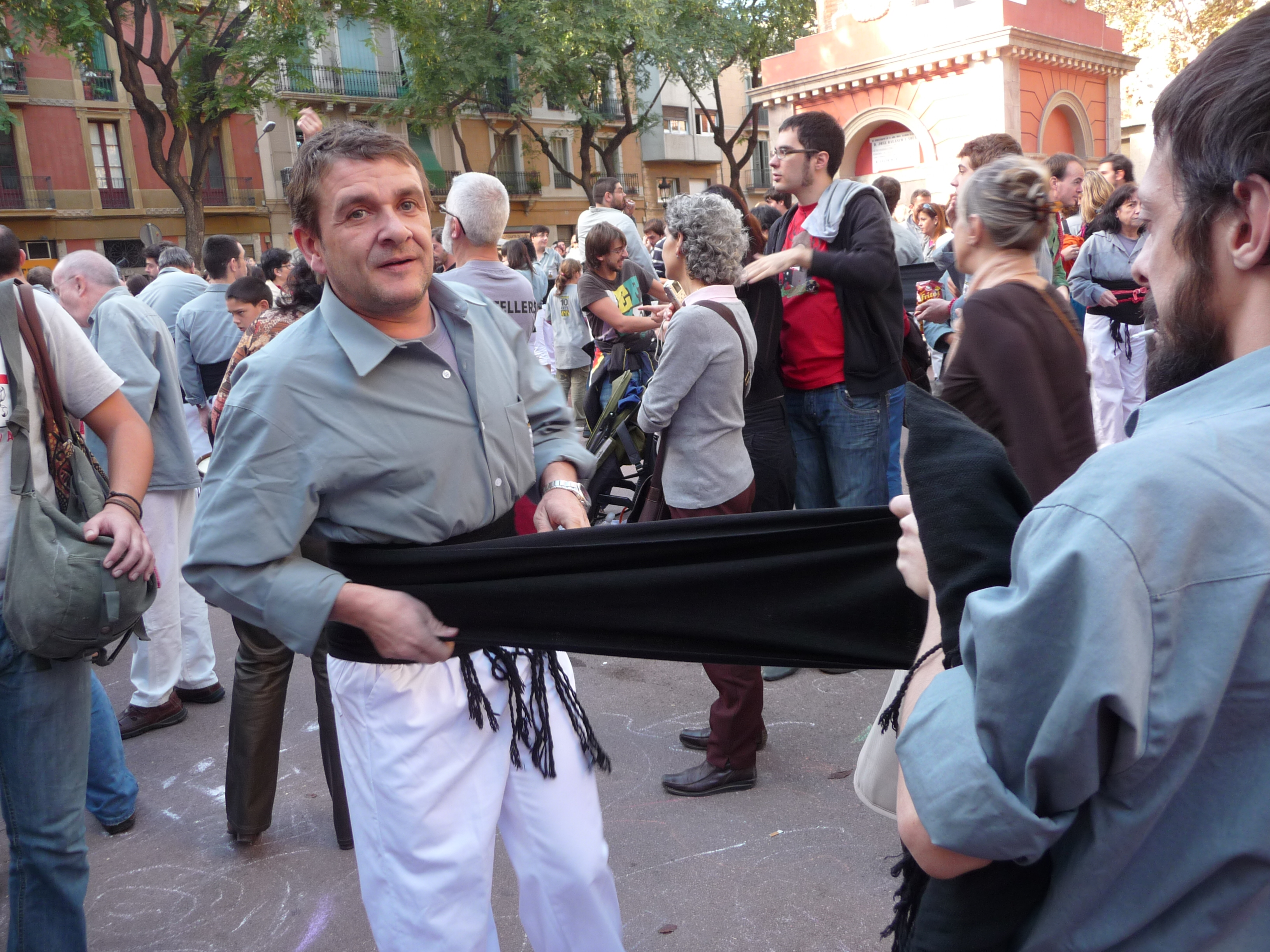 Casteller col·locant-se la faixa amb l'ajut d'un company, com és costum.